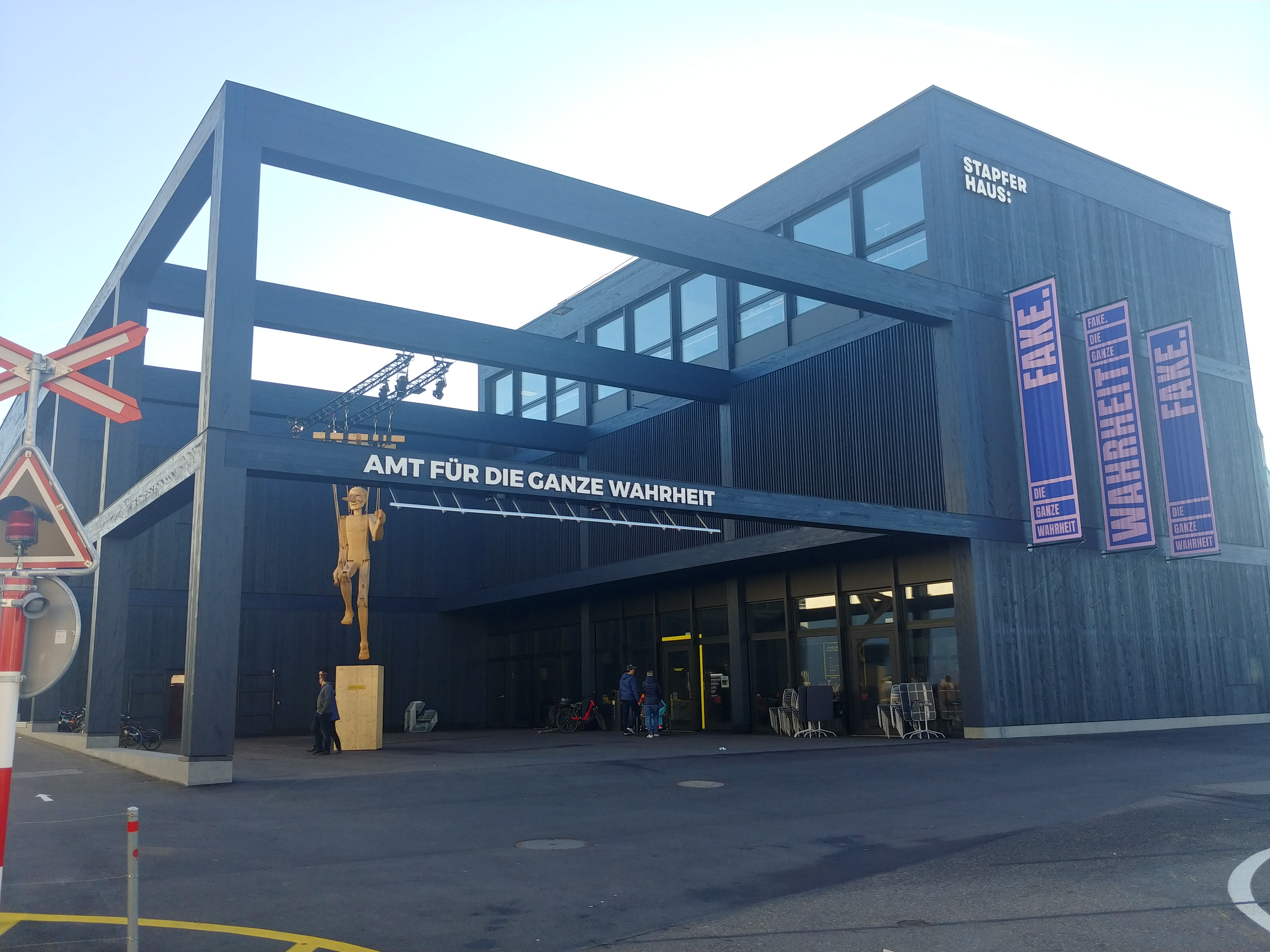 Museum Stapferhaus in Lenzburg, Aarau, Schweiz